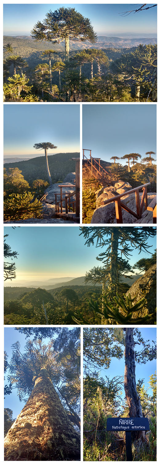 Collage de fotografías del parque nacional chileno Nahuelbuta , ubicado entre la octava región del Bíobío y la novena región de la araucanía.